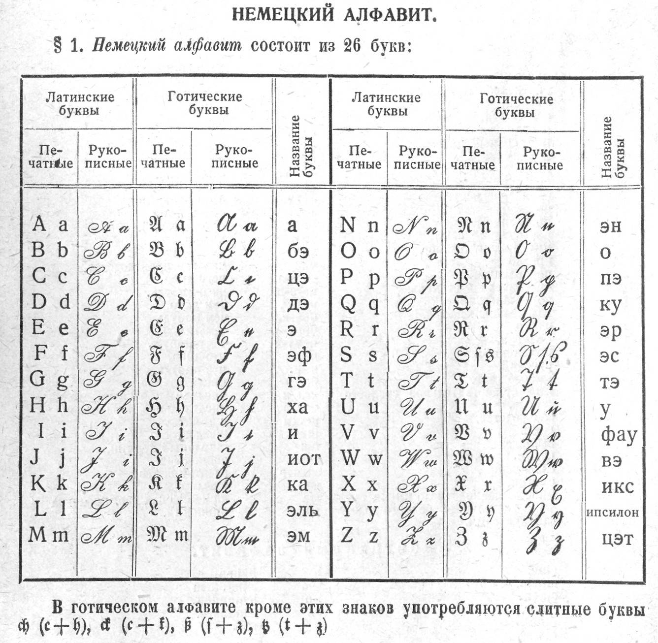 Немецкий алфавит